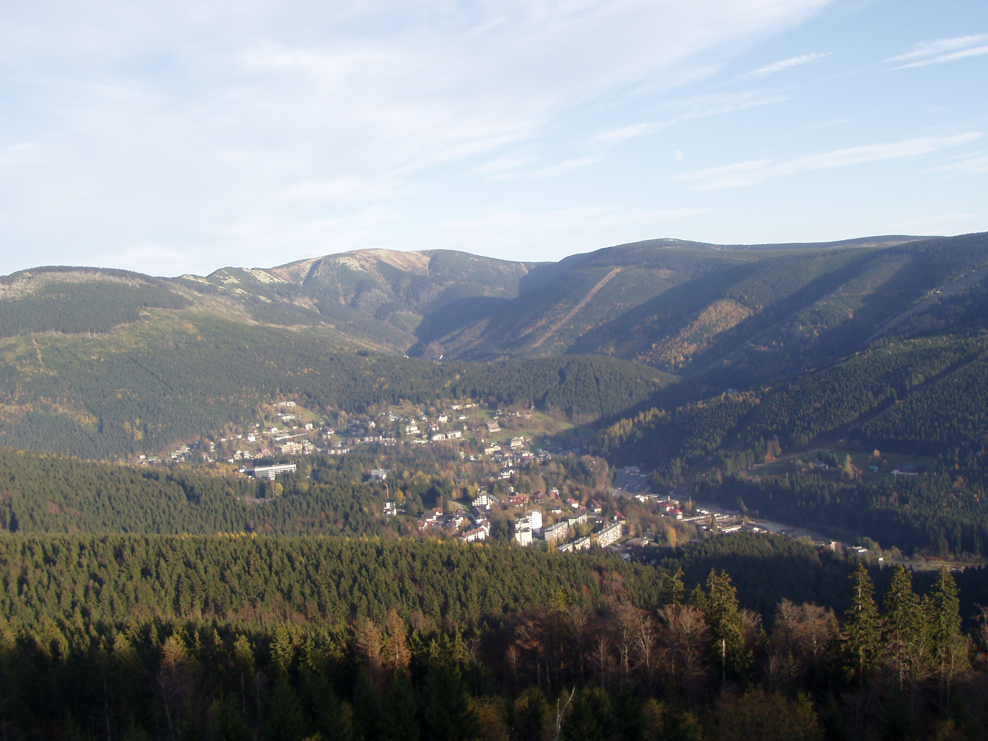 Harrachova skála